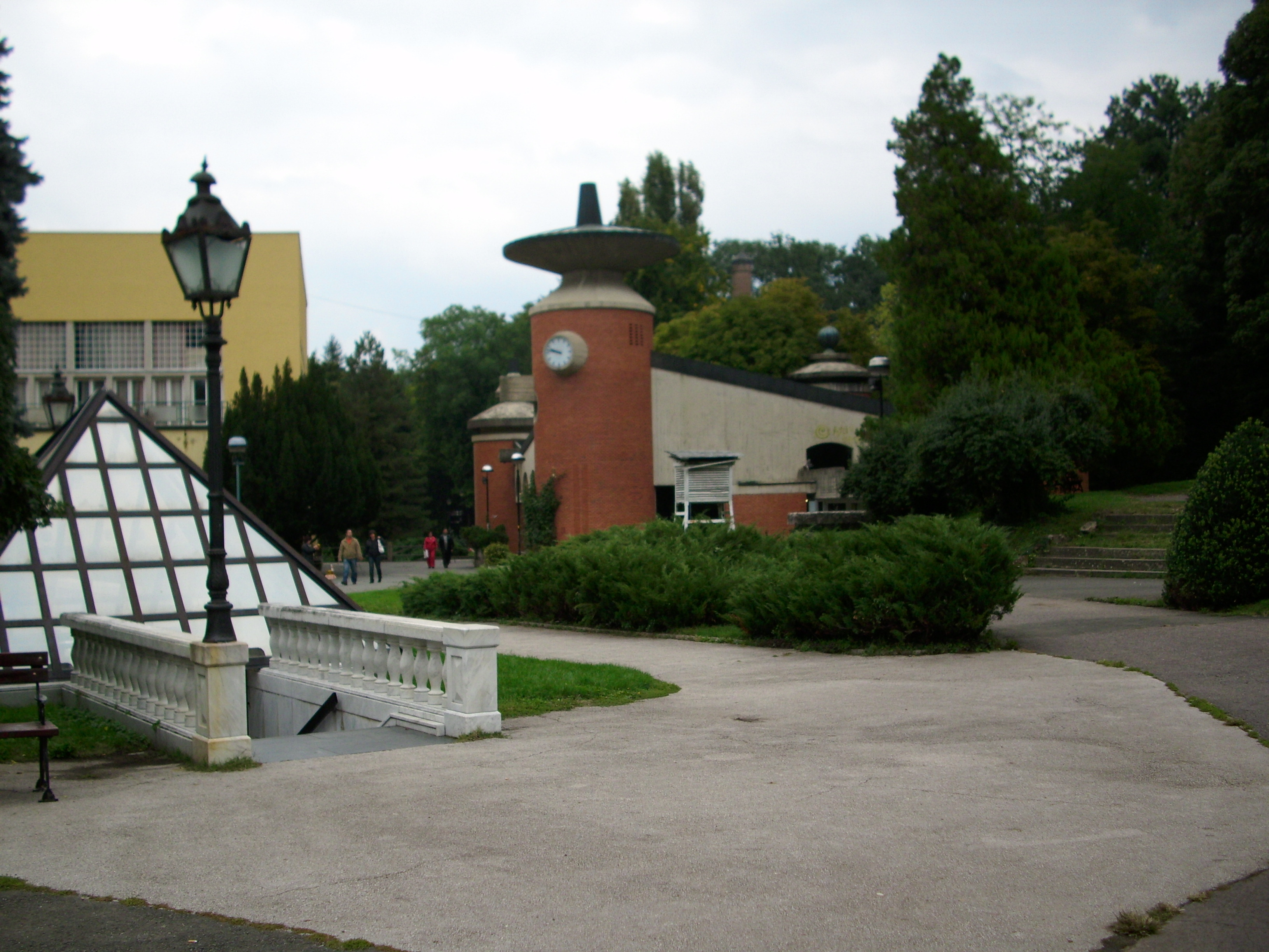 Део "Купатила" (жута зграда), римски бунар и извор "Топла вода"